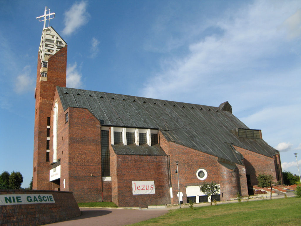 Sanktuarium Miłosierdzia Bożego w Łomży